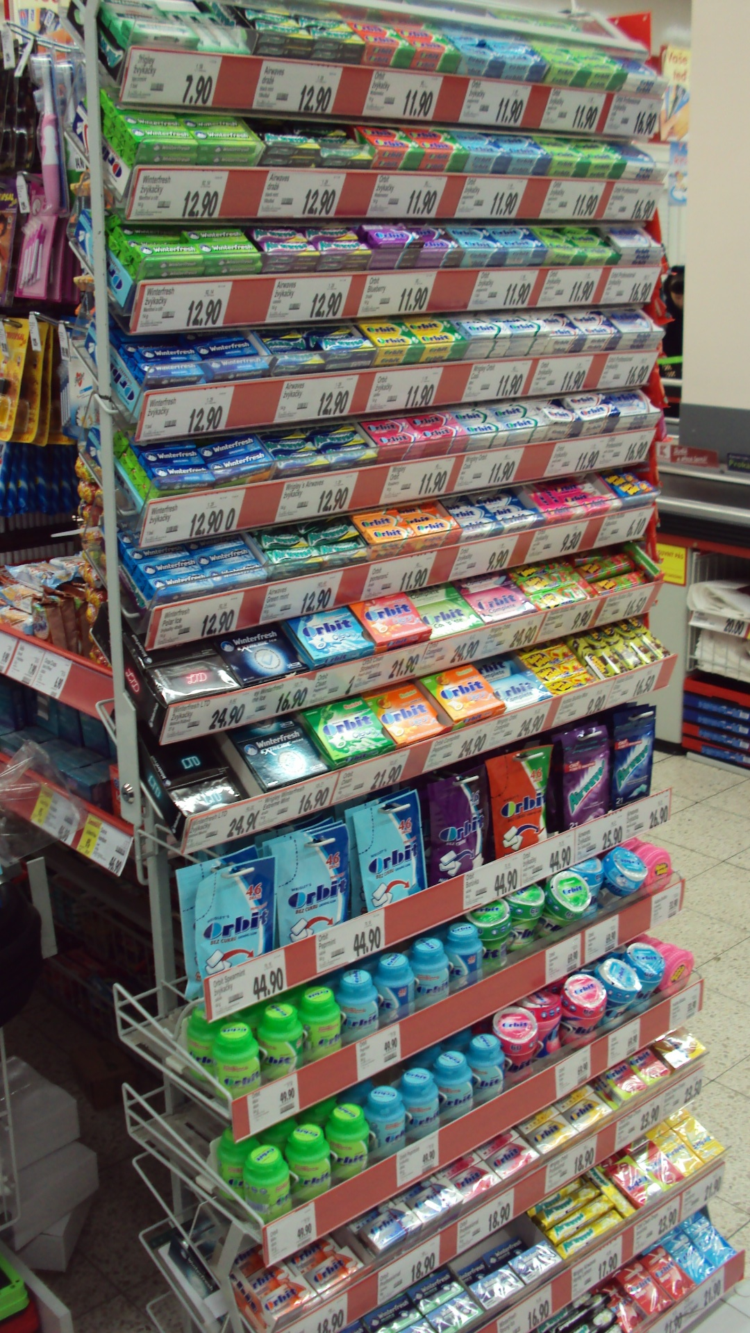 Stojan se žvýkačkami Wrigley v prodejně Kaufland